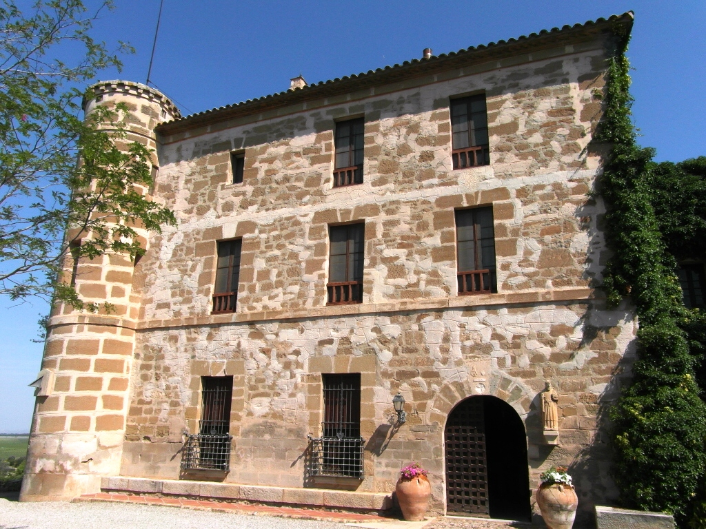 Intervenció en edifici d'origen medieval.